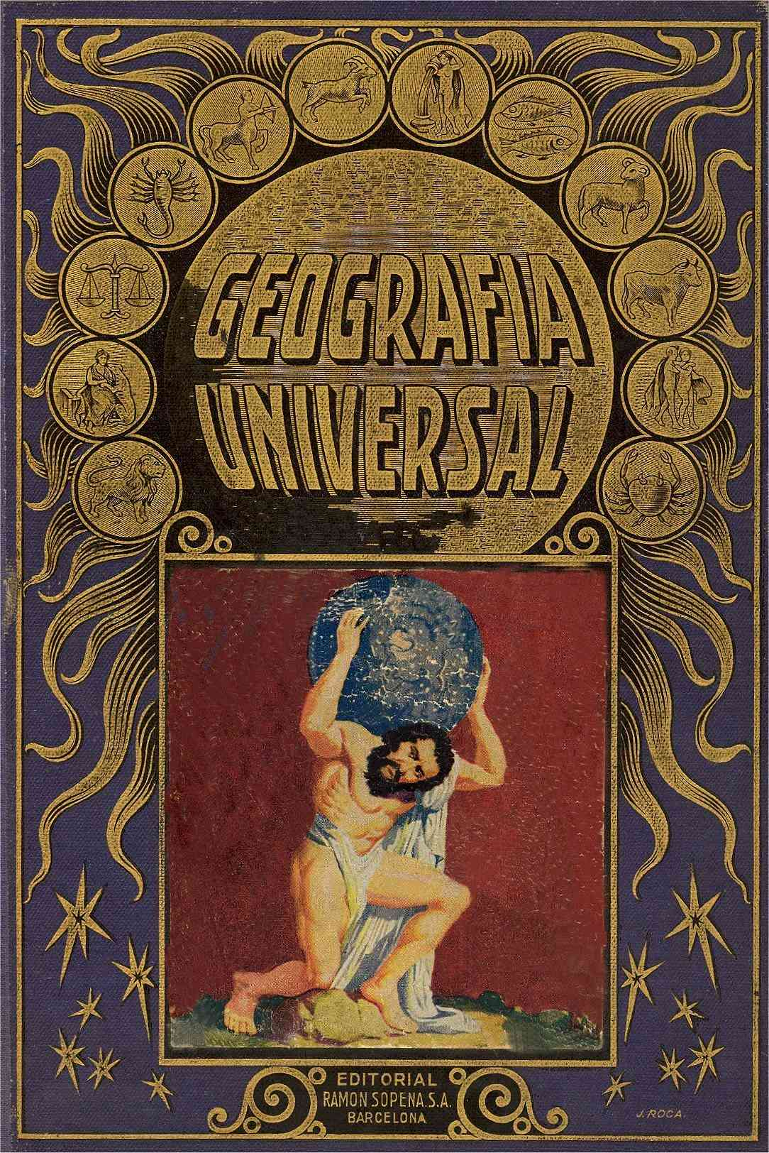 Geografia Universal - Editorial Ramon Sopena S.A. Barcelona 1935 - tercera edicion